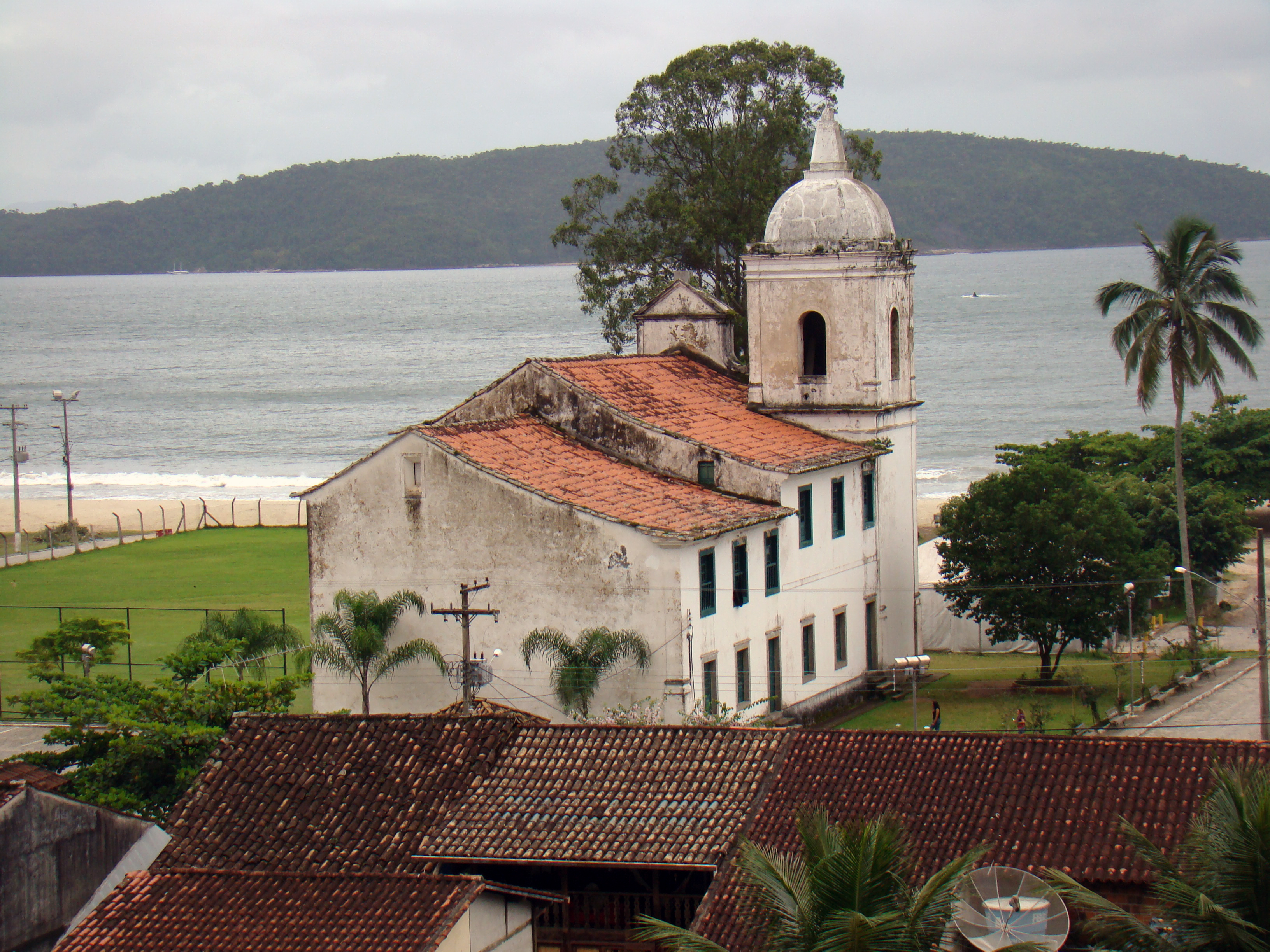 Igreja de Nossa Senhora do Rosário